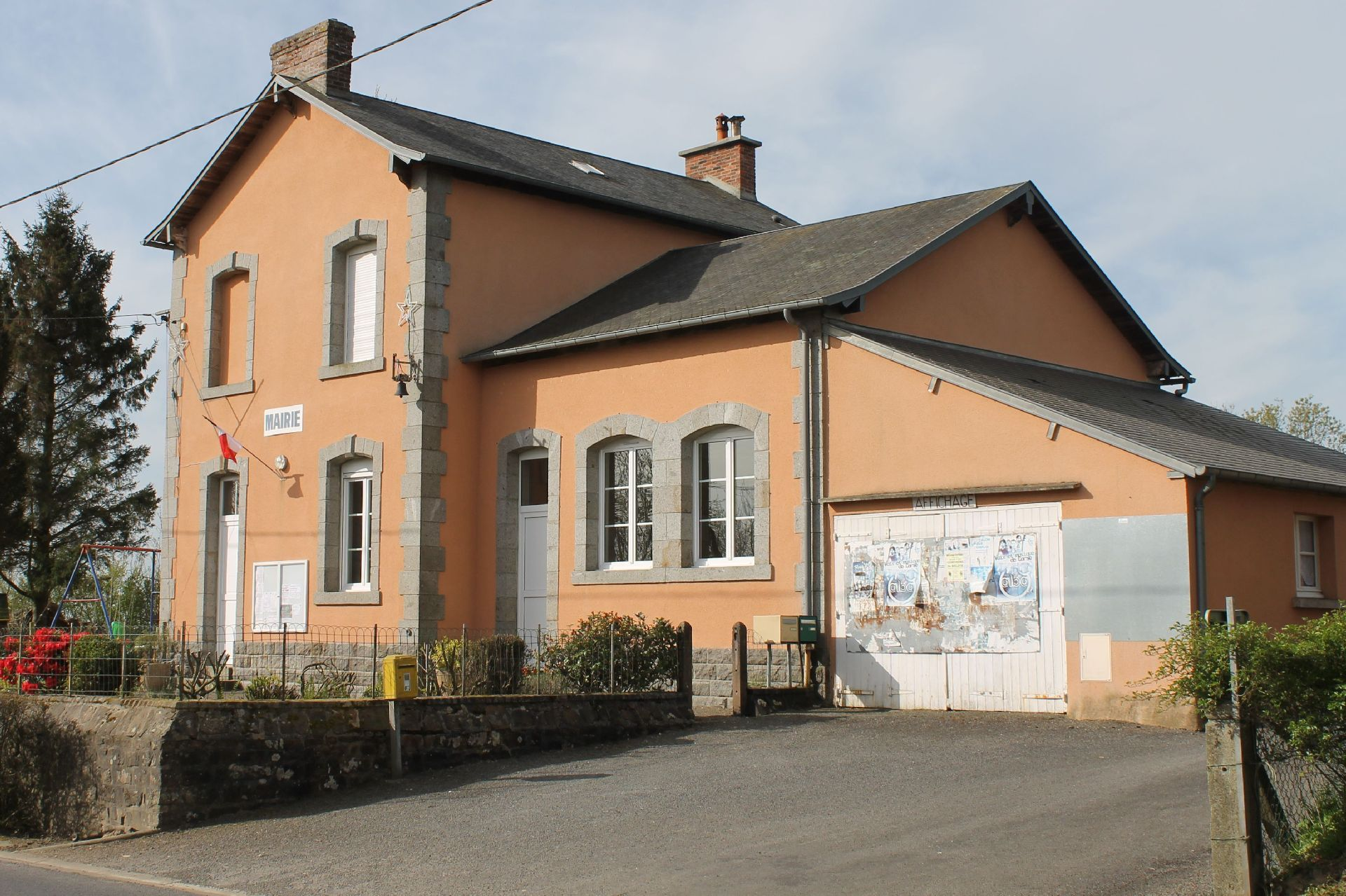 Mairie de Hocquigny